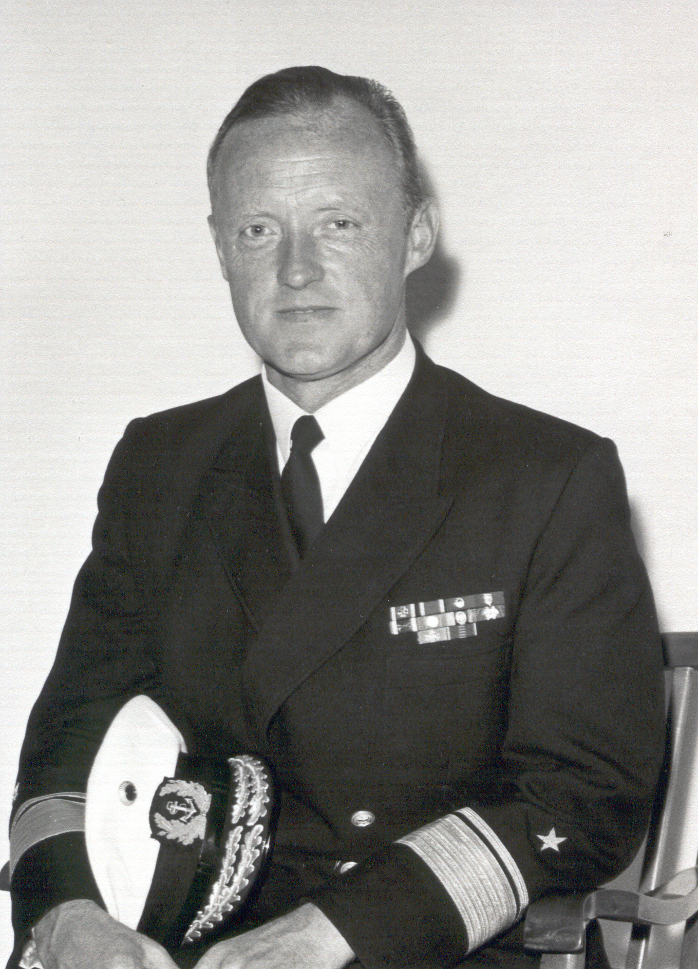 Porträtfotografie von Flottillenadmiral Dr.Karl Karl Schneider-Pungs